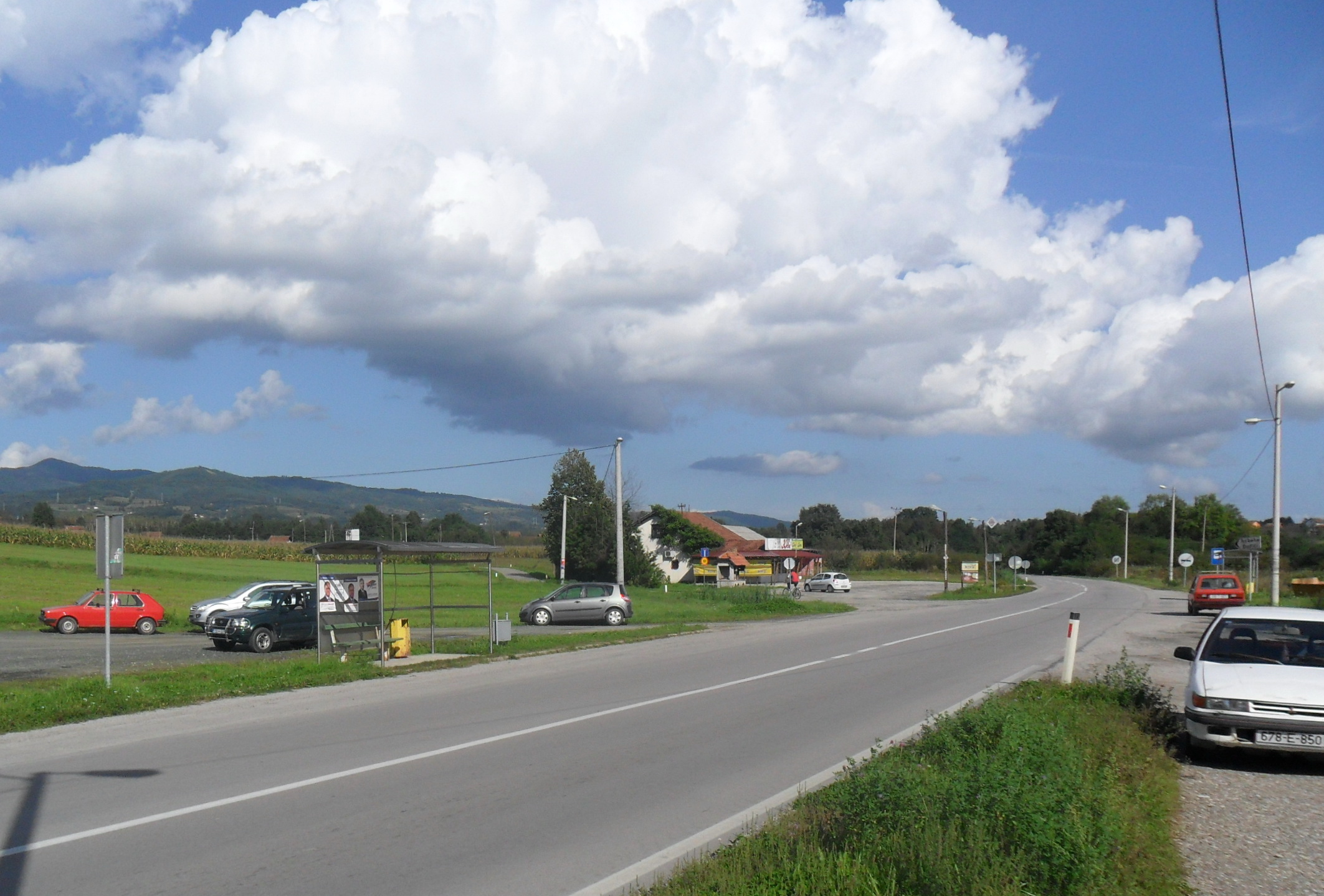 Verići